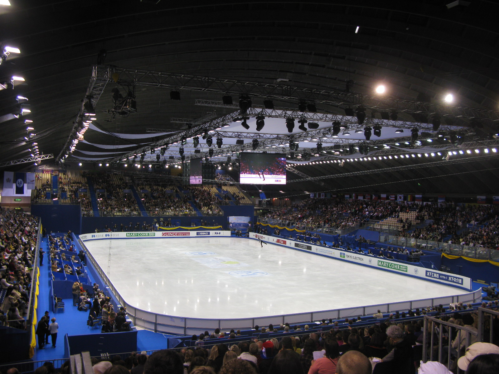 La patinoire du Palais des expositions de l'Acropolis de Nice, lors des championnats du monde de patinage artistique 2012.